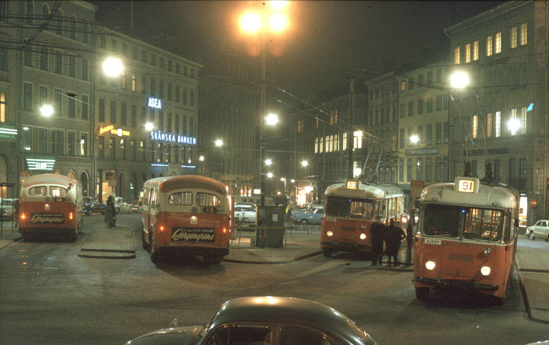 Nattbild från Brunkebergstorg med bussar och trådbussar